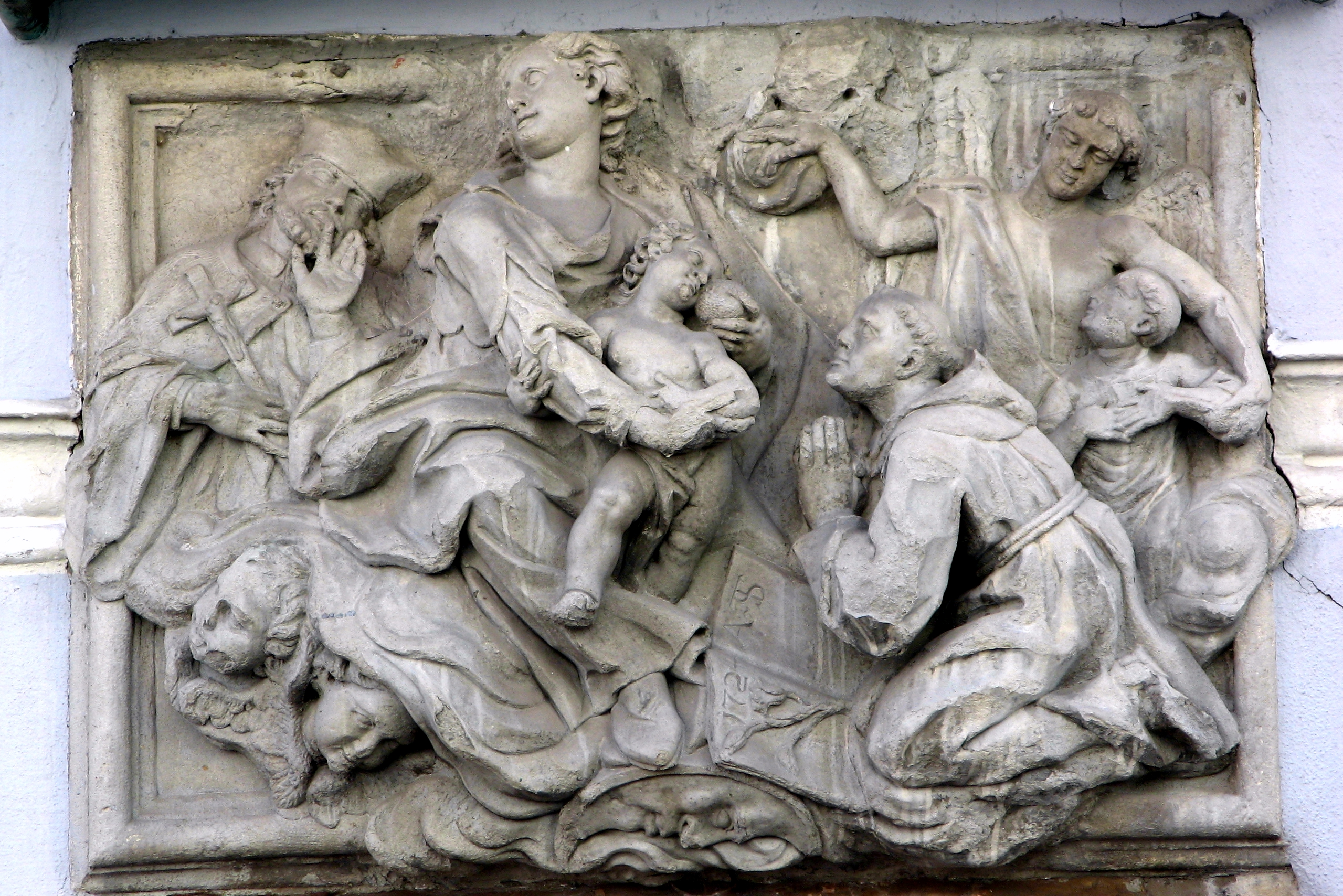 Sandsteinrelief von Anton Sturm am sogenannten Sturmhaus in Füssen